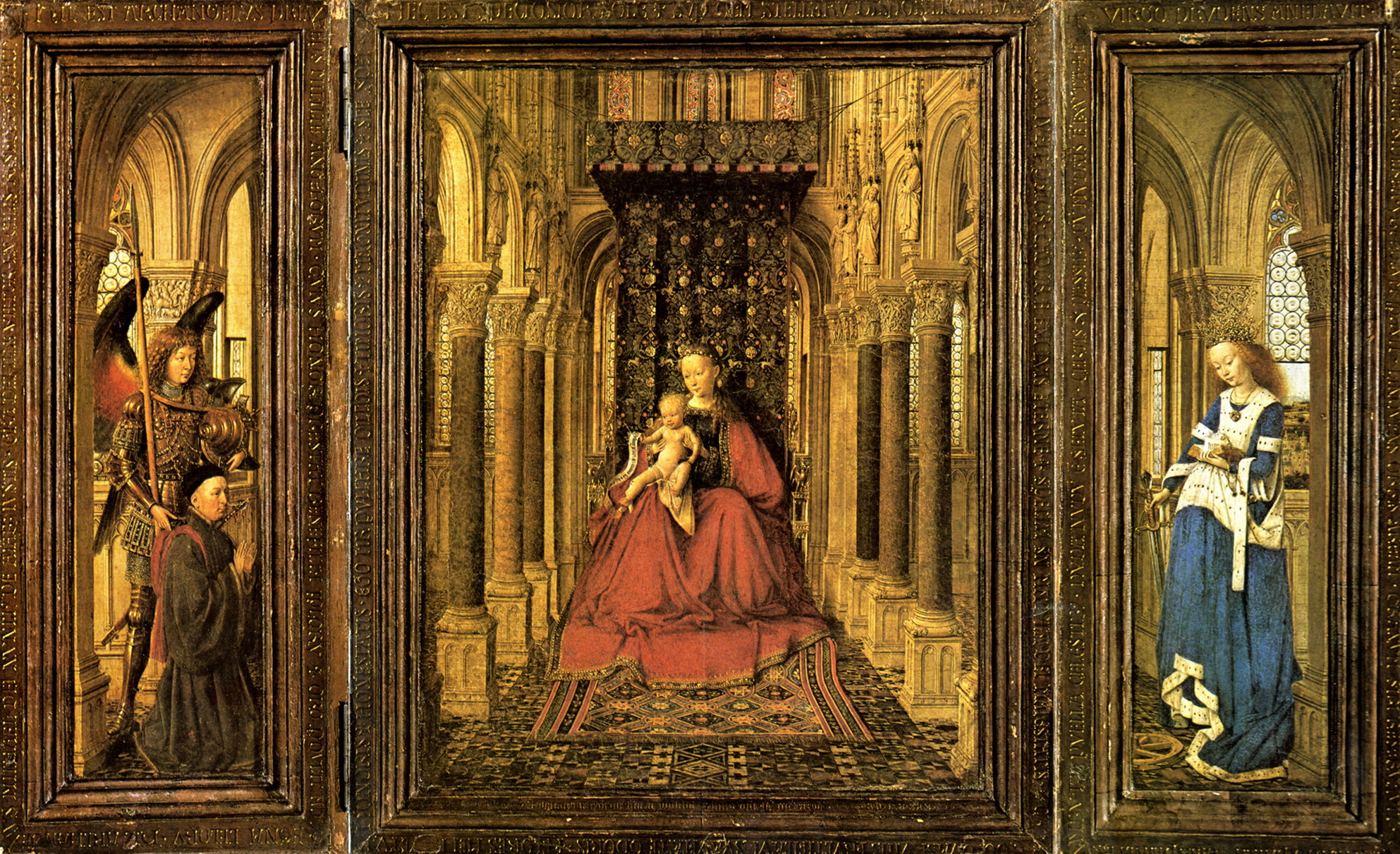 In der Mitte des Altarbildes die thronende Maria mit dem Kind, links der Erzengel Michael mit dem Stifter und rechts die Hl. Katharina.